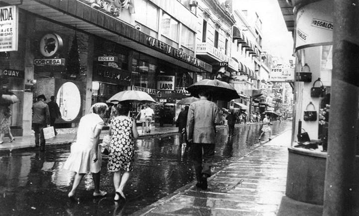 Día de lluvia en Buenos Aires, calle Florida vista desde la calle Lavalle, 1969. Documento fotográfico. Inventario 304181.